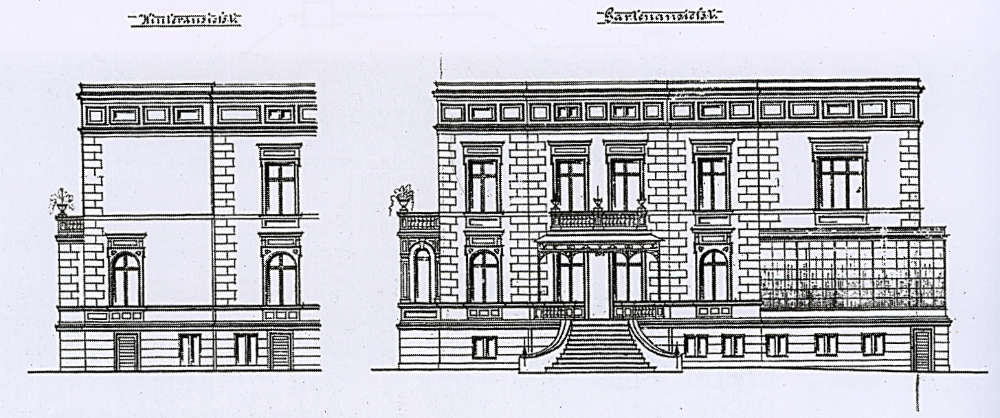 Villa